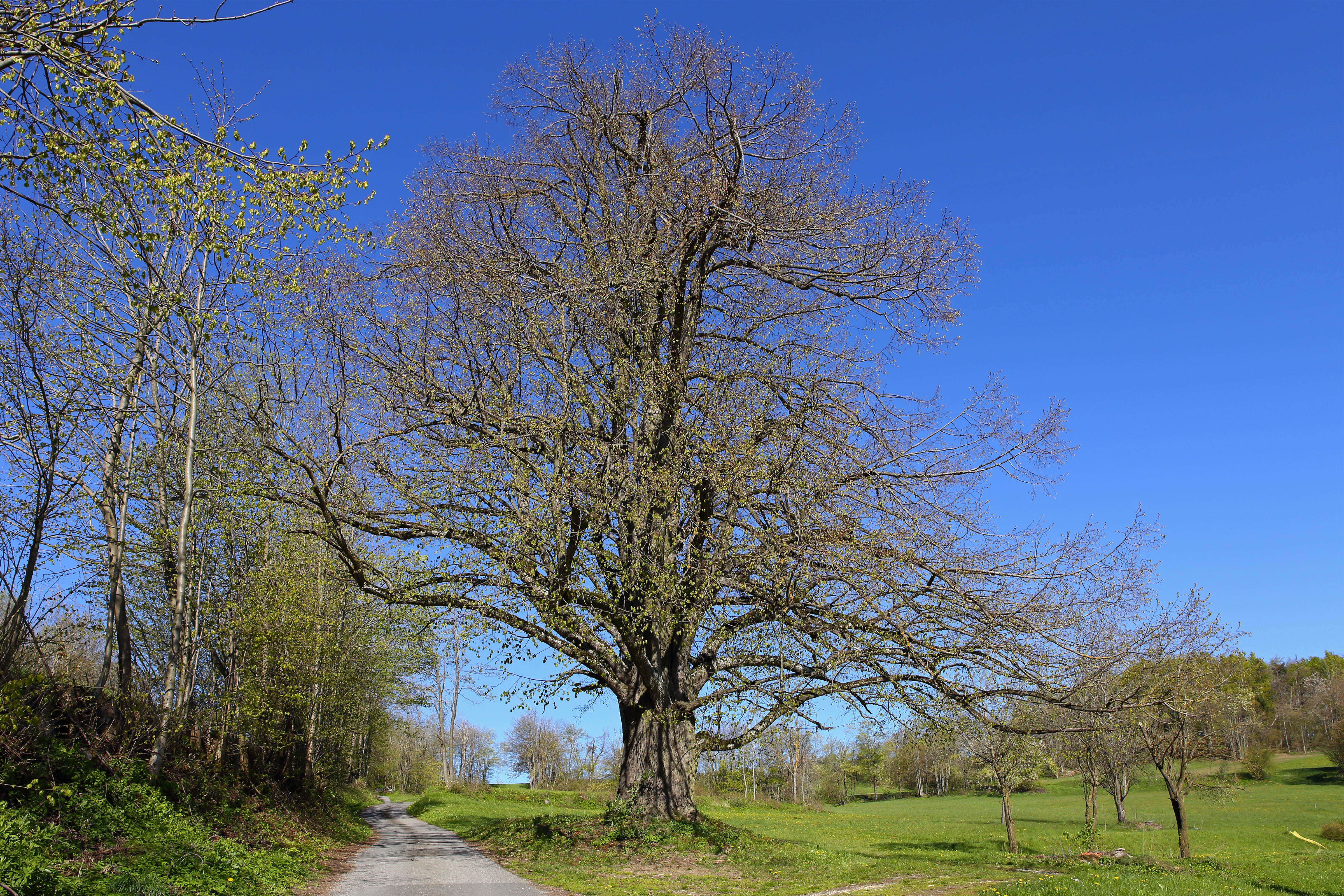 Die Sommerlinde in Günzles (Gemeine Kottes-Purk) wurde 1941 zum Naturdenkmal erklärt. This media shows the natural monument in Lower Austria with the ID ZT-039.